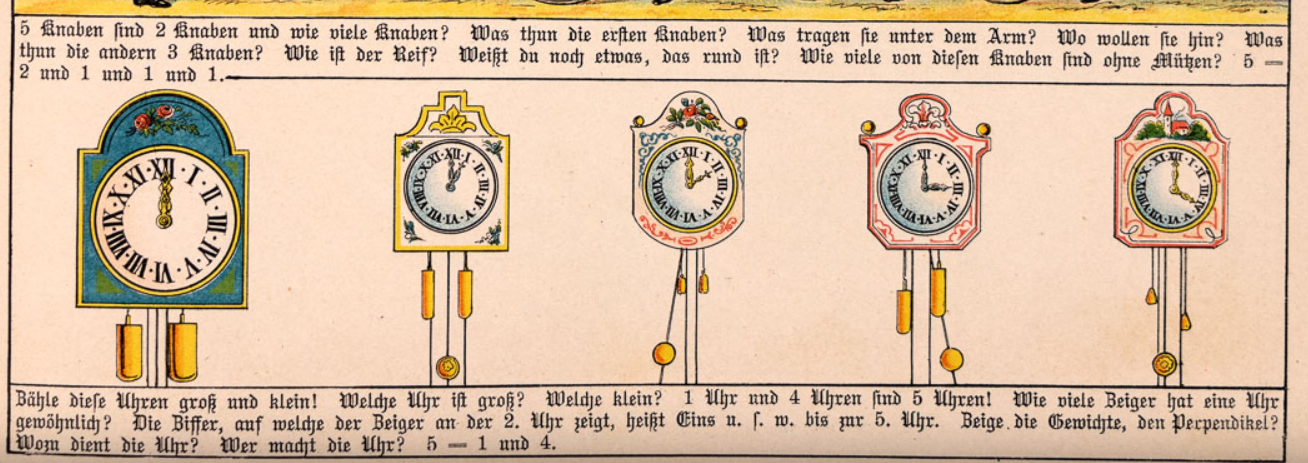 Ausschnitt aus einer Seite von Nikolaus Bohny's neuem Bilderbuch